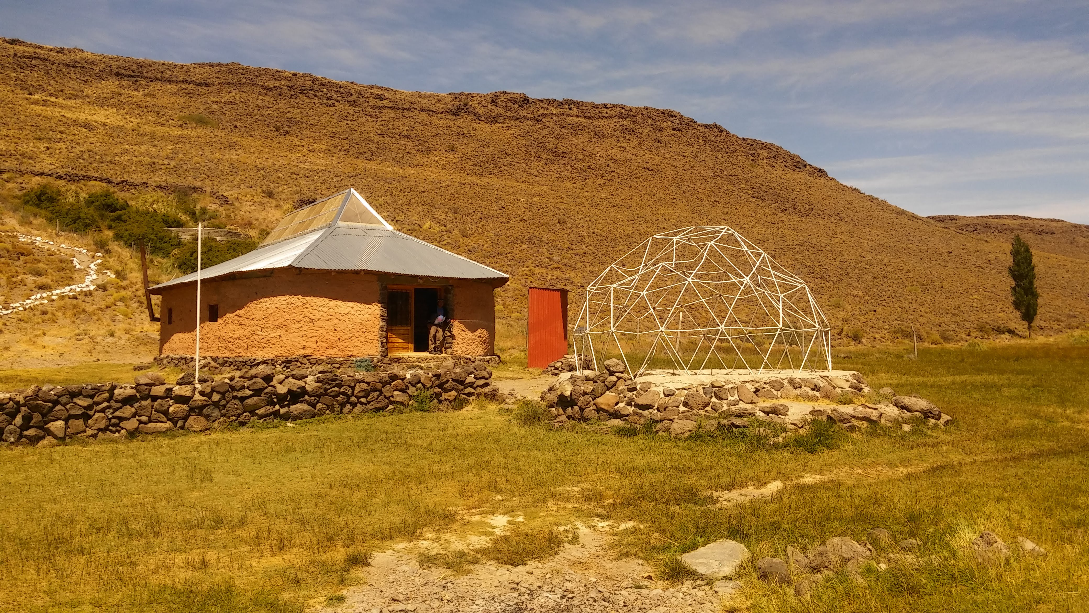 Casa construida a base de cenizas, proveniente de la erupción de un Volcán. Ubicada en las Chacras de Ingeniero Jacobacci, Río Negro. Es conocida como "RUCA" en mapudungun significa "casa"